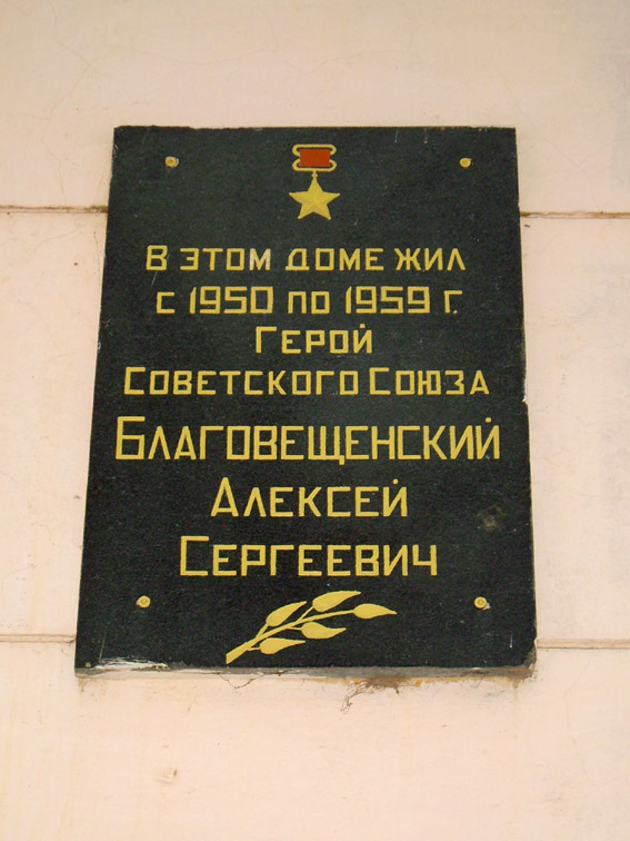 Мемориальная доска в посёлке Чкаловский на доме, в котором в 1950-1959 годах жил Герой Советского Союза, генерал-лейтенант авиации А.С.Благовещенский